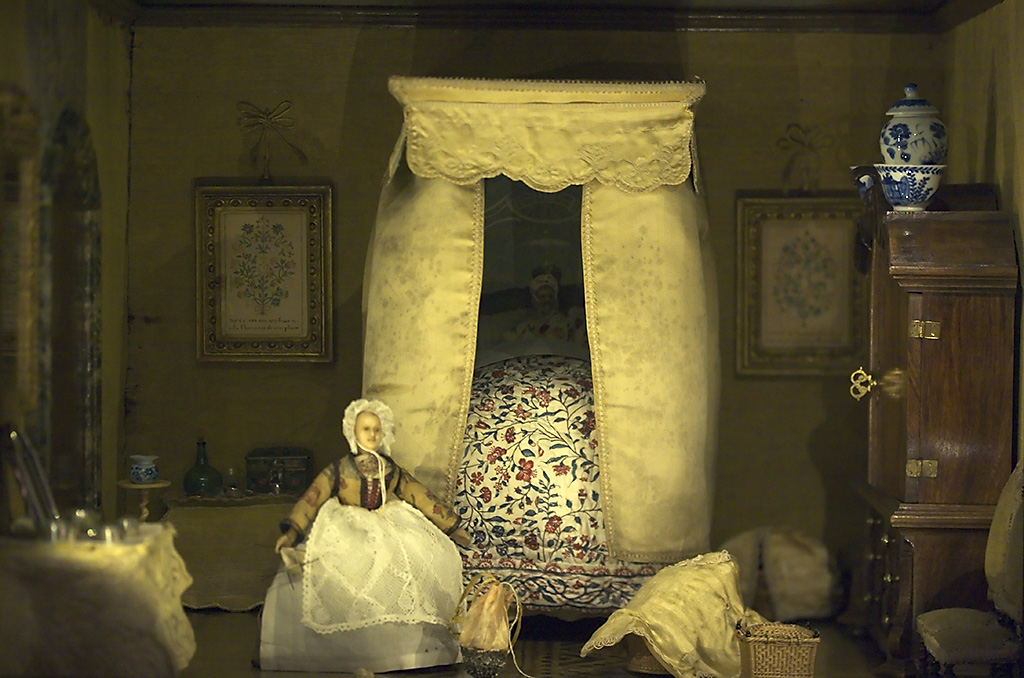 Poppenhuis Het poppenhuis van Sara Rothe